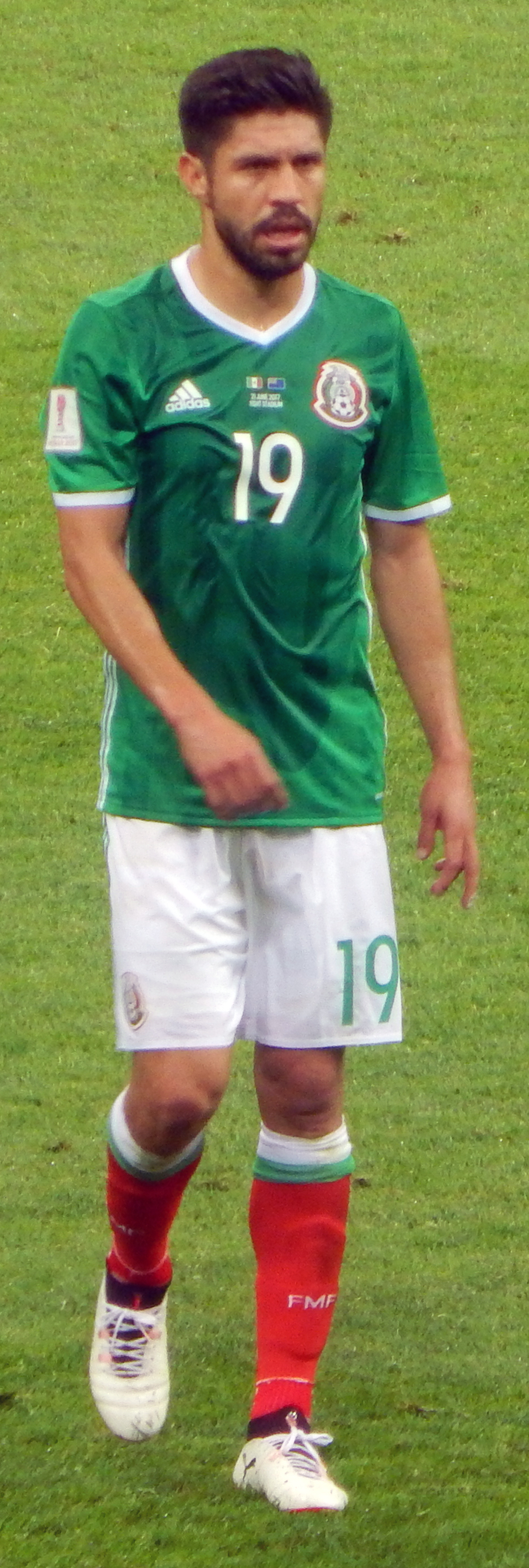 Орибе Перальта в матче против сборной Новой Зеландии